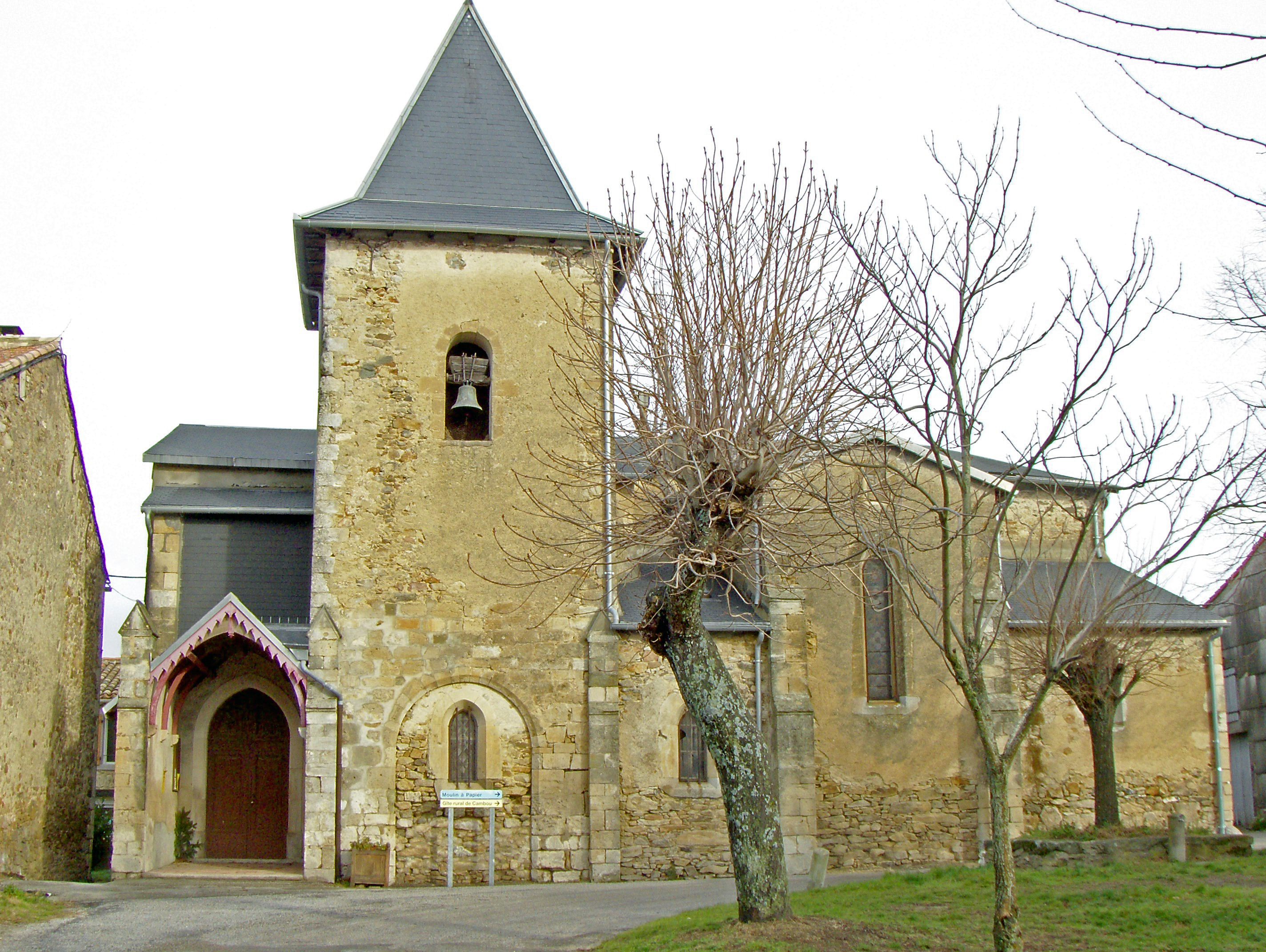 Eglise Ste Marie de l'assomption à Brousses